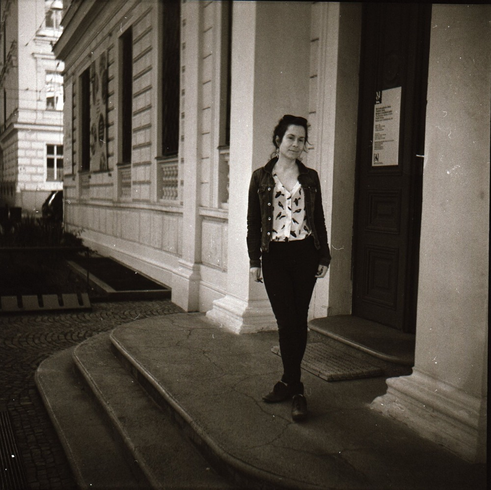 Jana Písaříková před Moravskou galerií